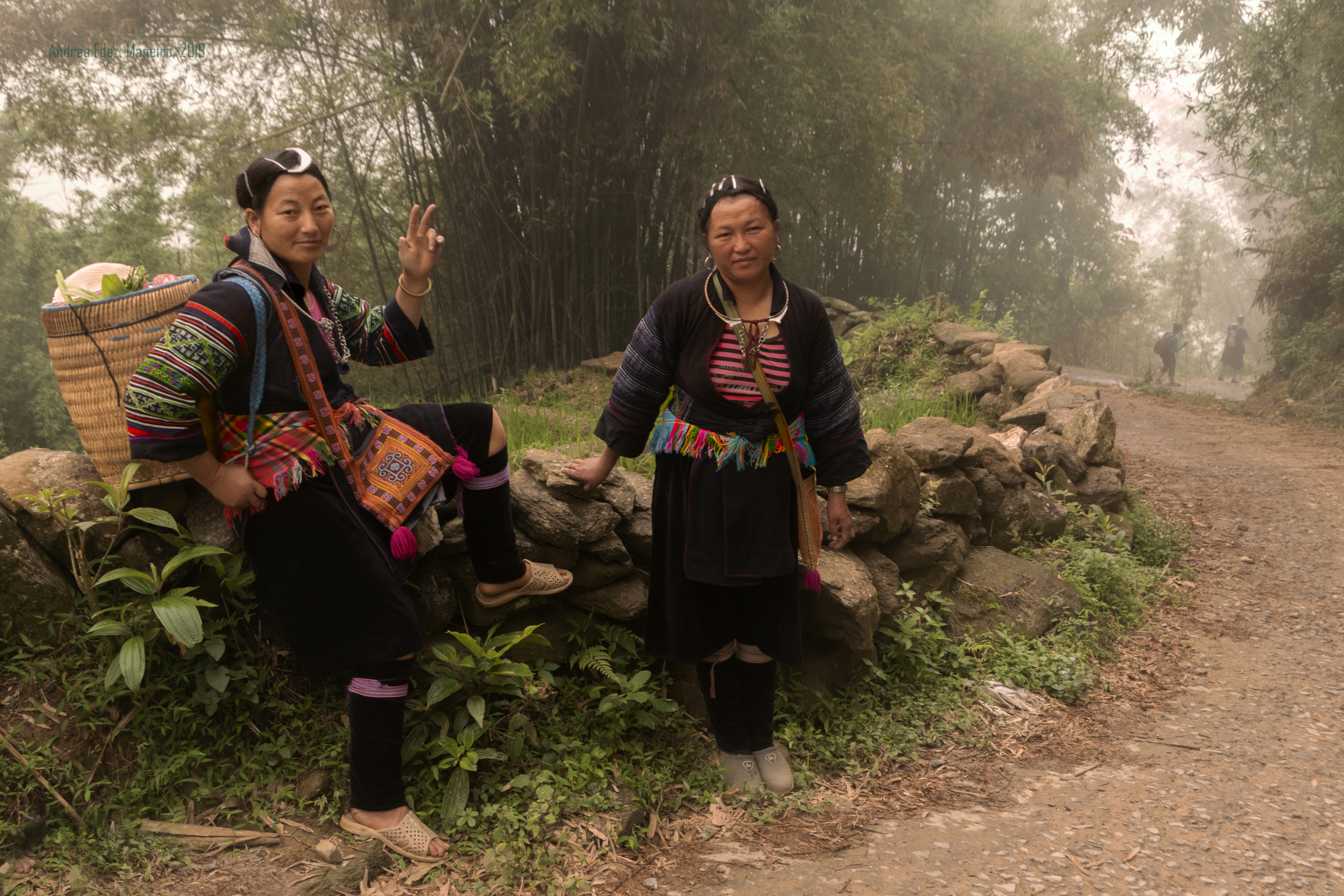 Guías de trekkin en las montañasde Sa Pa.